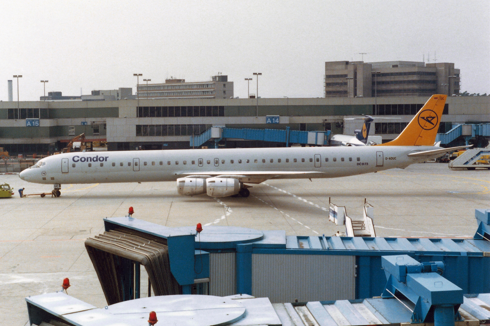 Frankfurt am Main (Rhein-Main AB) (FRA / EDDF / FRF) 7.1986